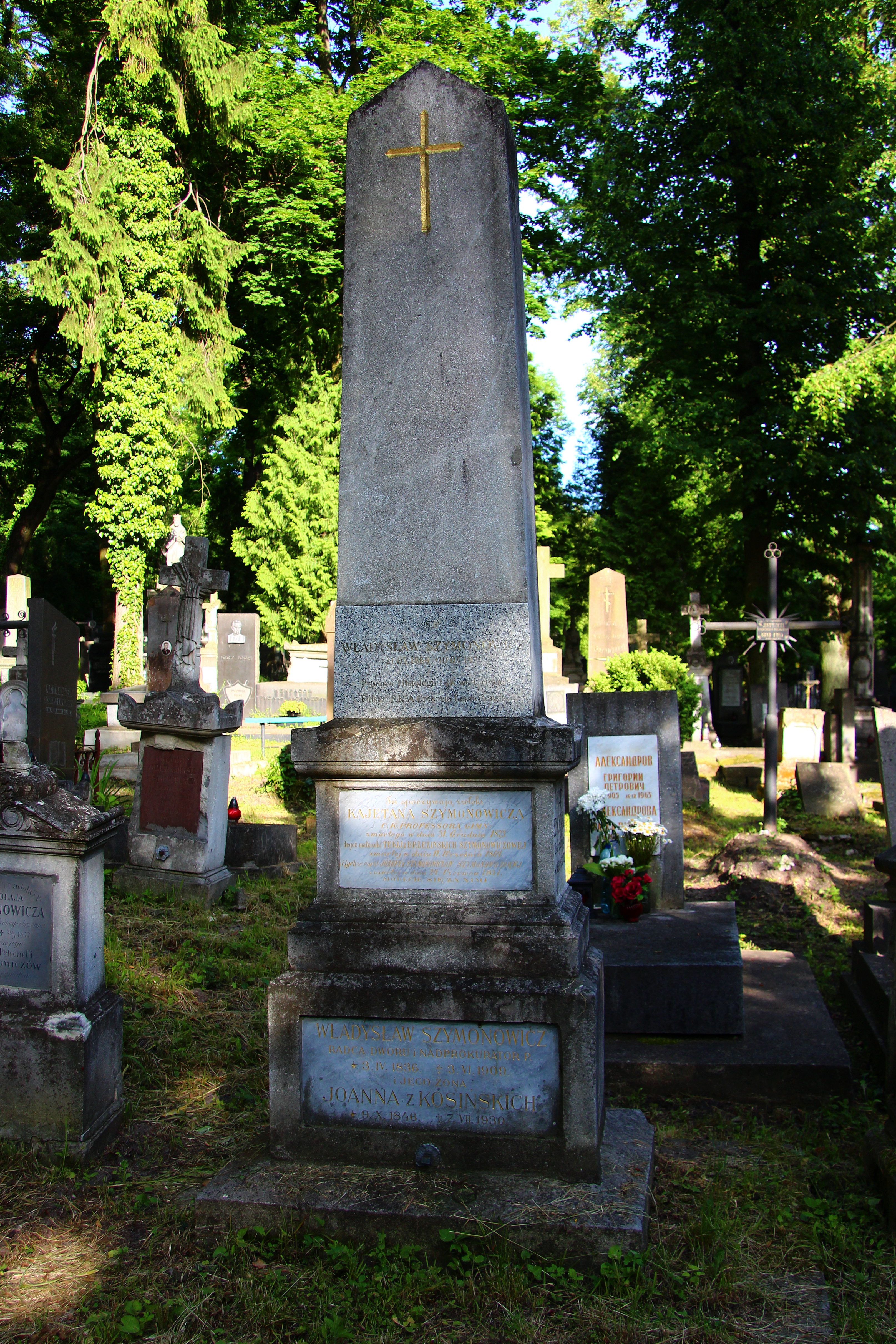 Поховання родини Шимоновичів.Личаківський цвинтар, поле № 12.